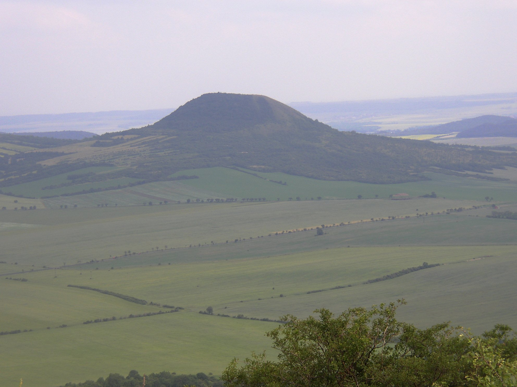 České středohoří. Pohled z Milé jihovýchodním směrem na (zprava doleva) Oblík.